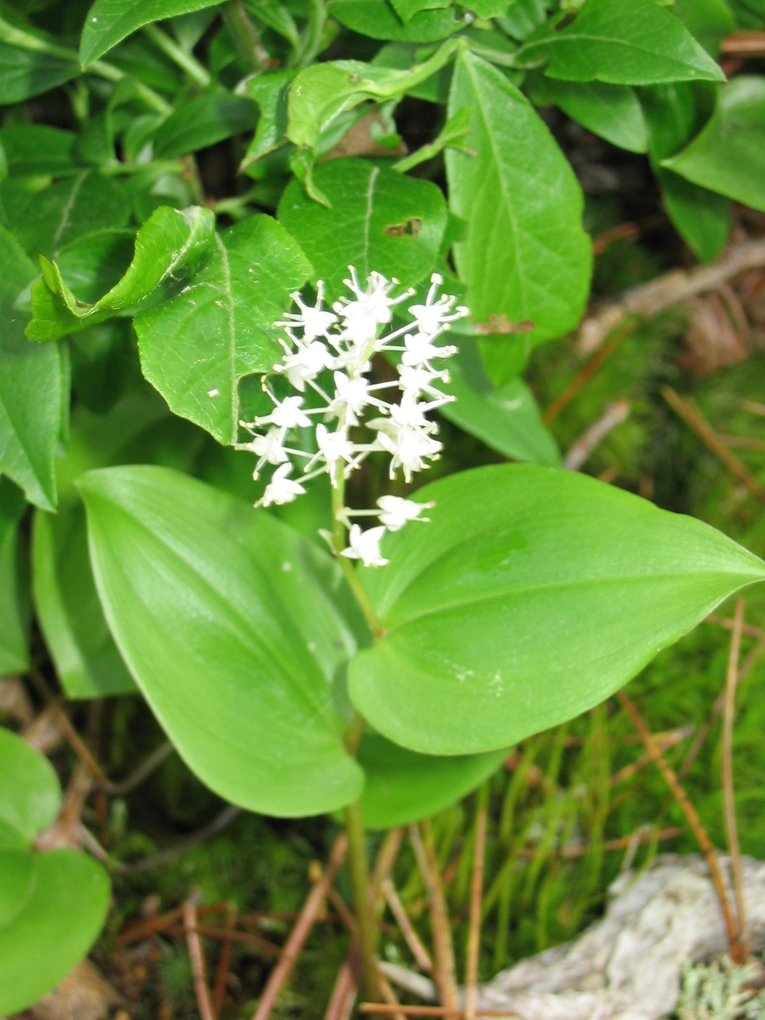 Maianthemum_canadense_1-eheep